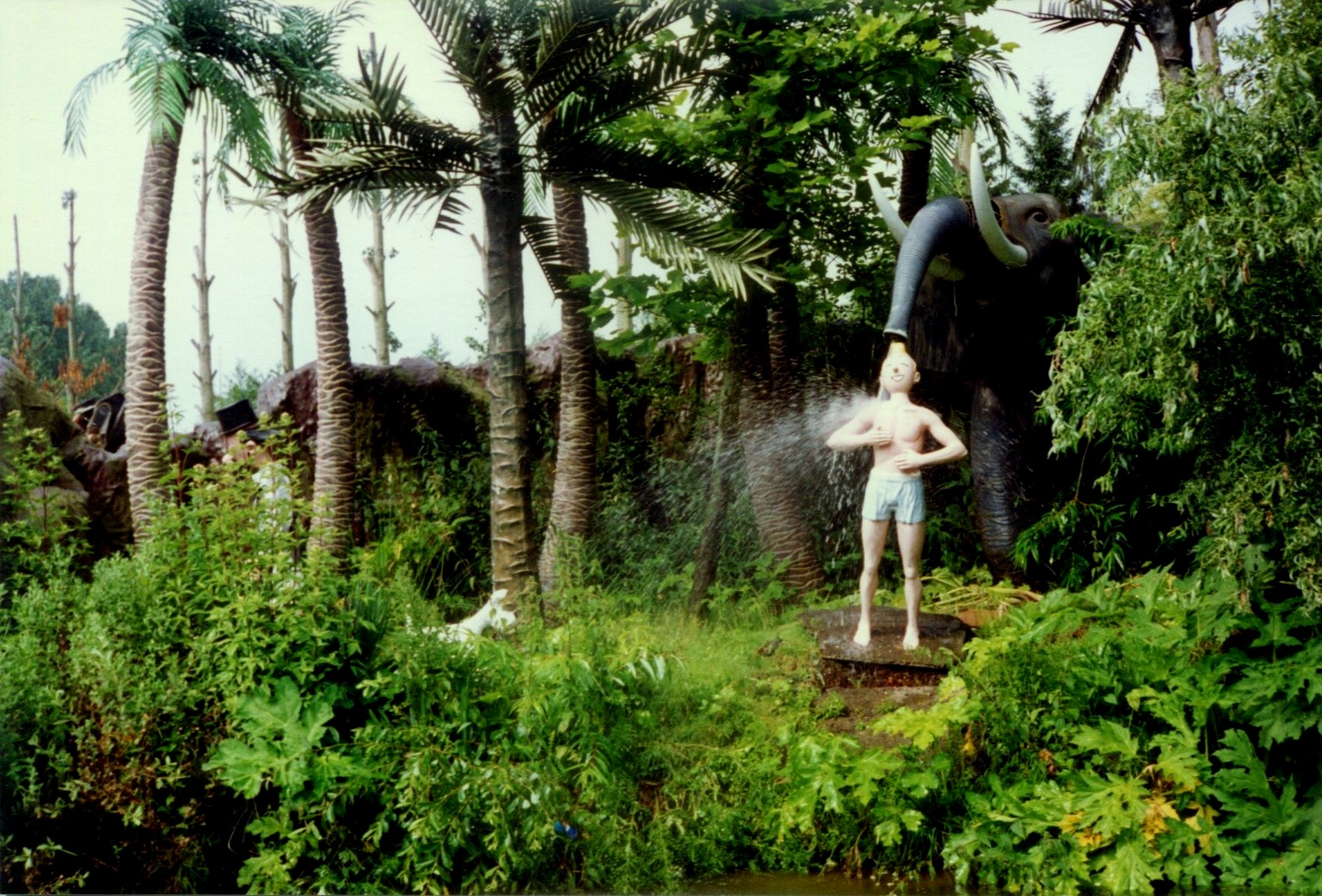 WalibiTintinJungle